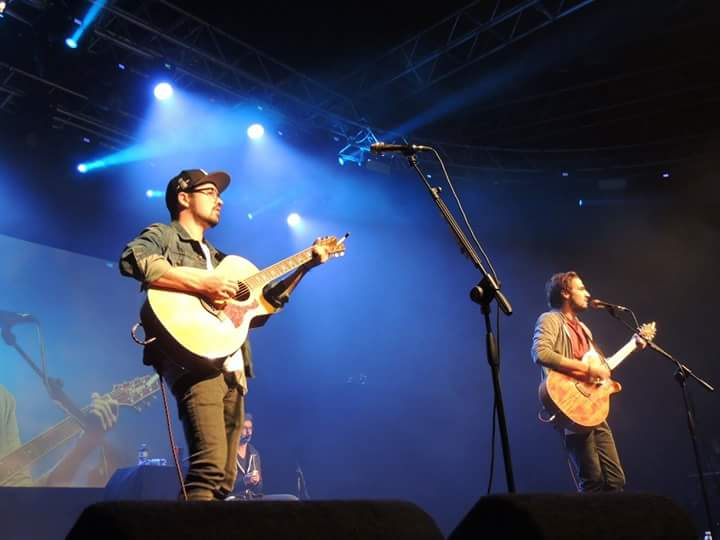 Heffron Drive a Milano